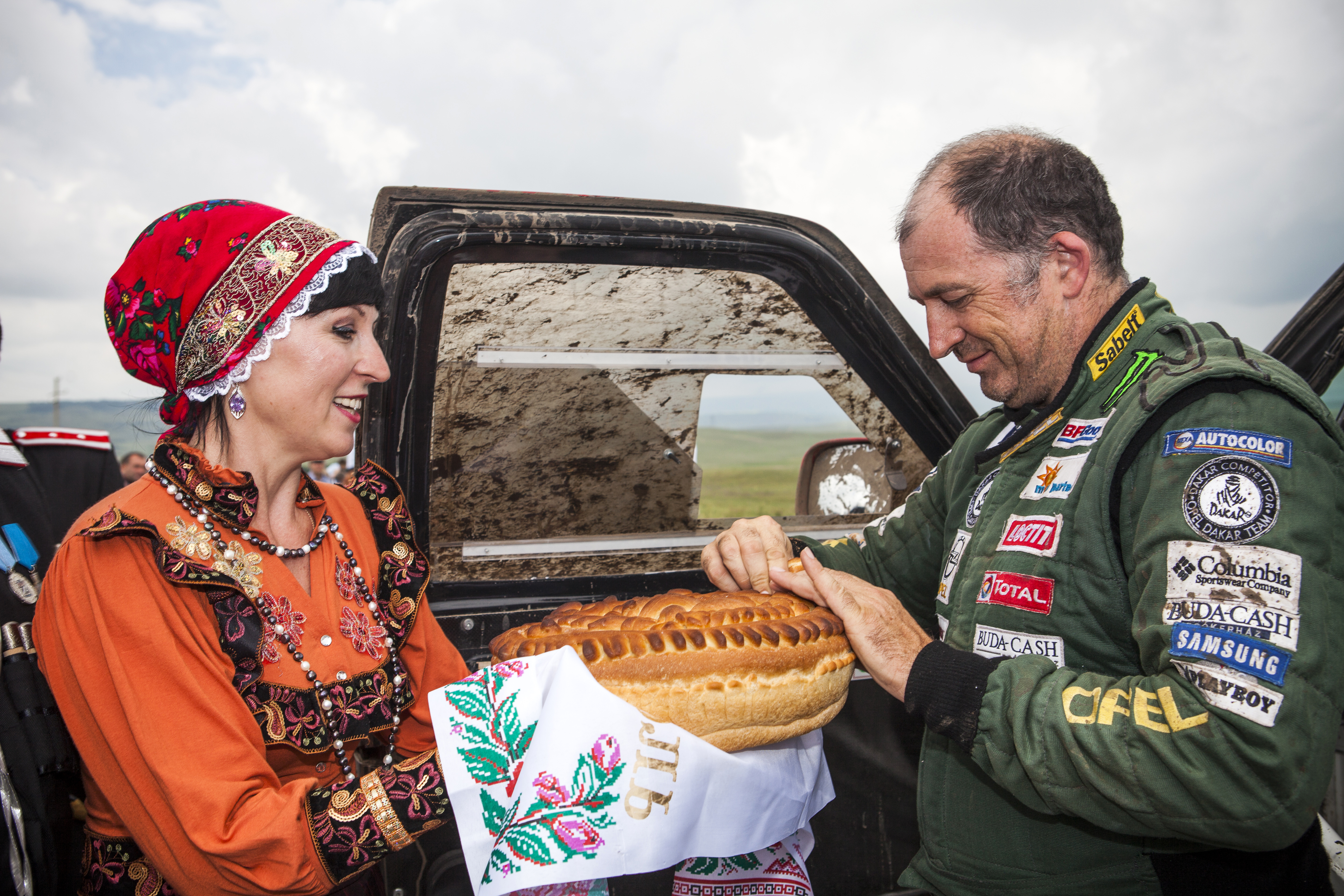 Гостеприимство местных жителей, встречающих участников марафона на финише скоростного спецучастка в России